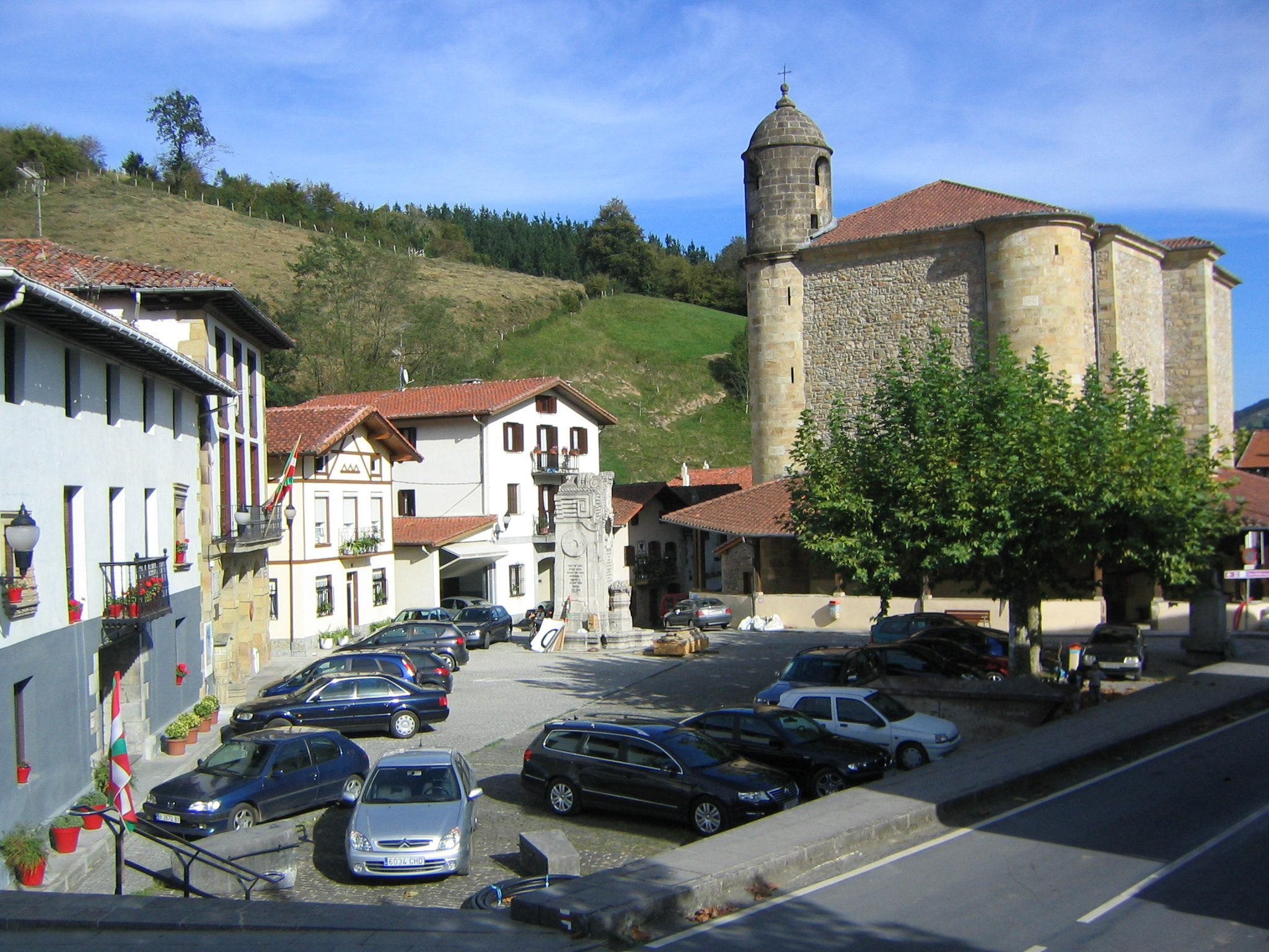 Plaza Simón Bolívar en Bolívar, Vizcaya, País Vasco, España.